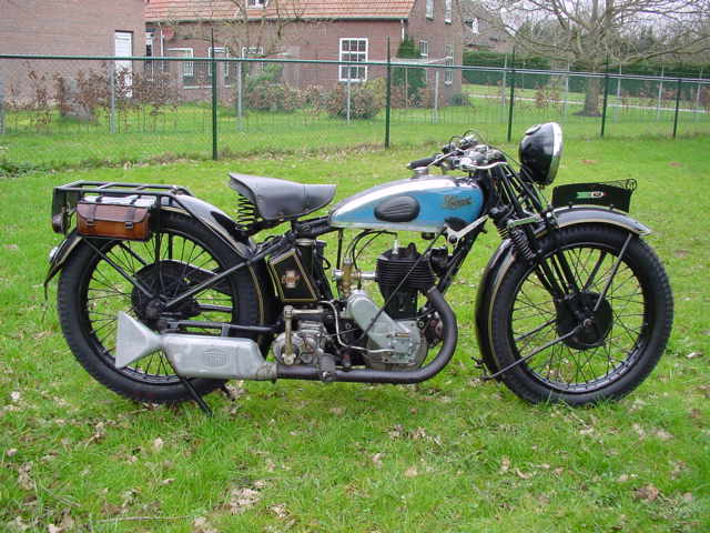 Terrot 1930 HST.